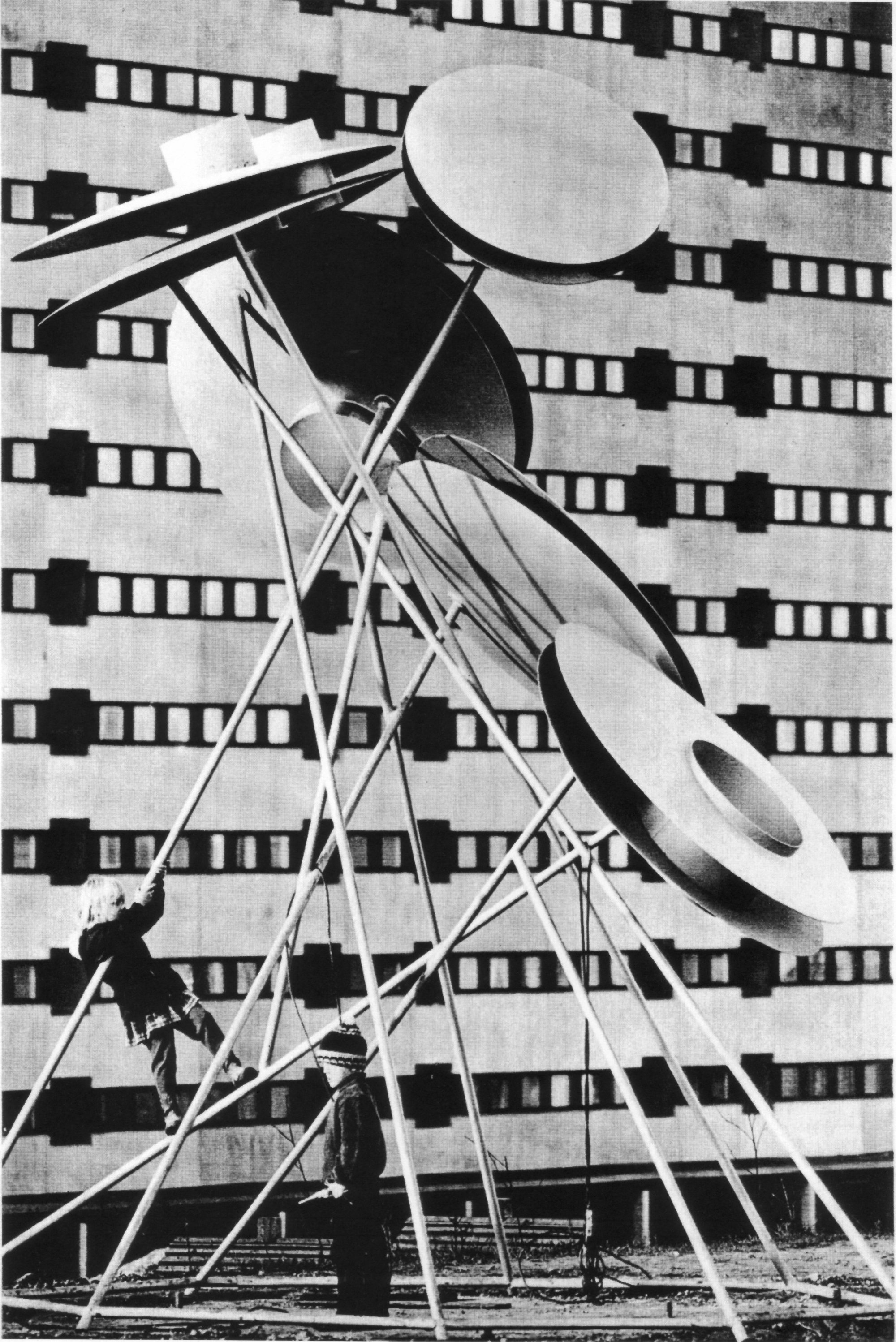 Magdalena Więcek, Lotnia, 1967, stal, wysokość 410 cm, Aalborg, fotografia archiwalna